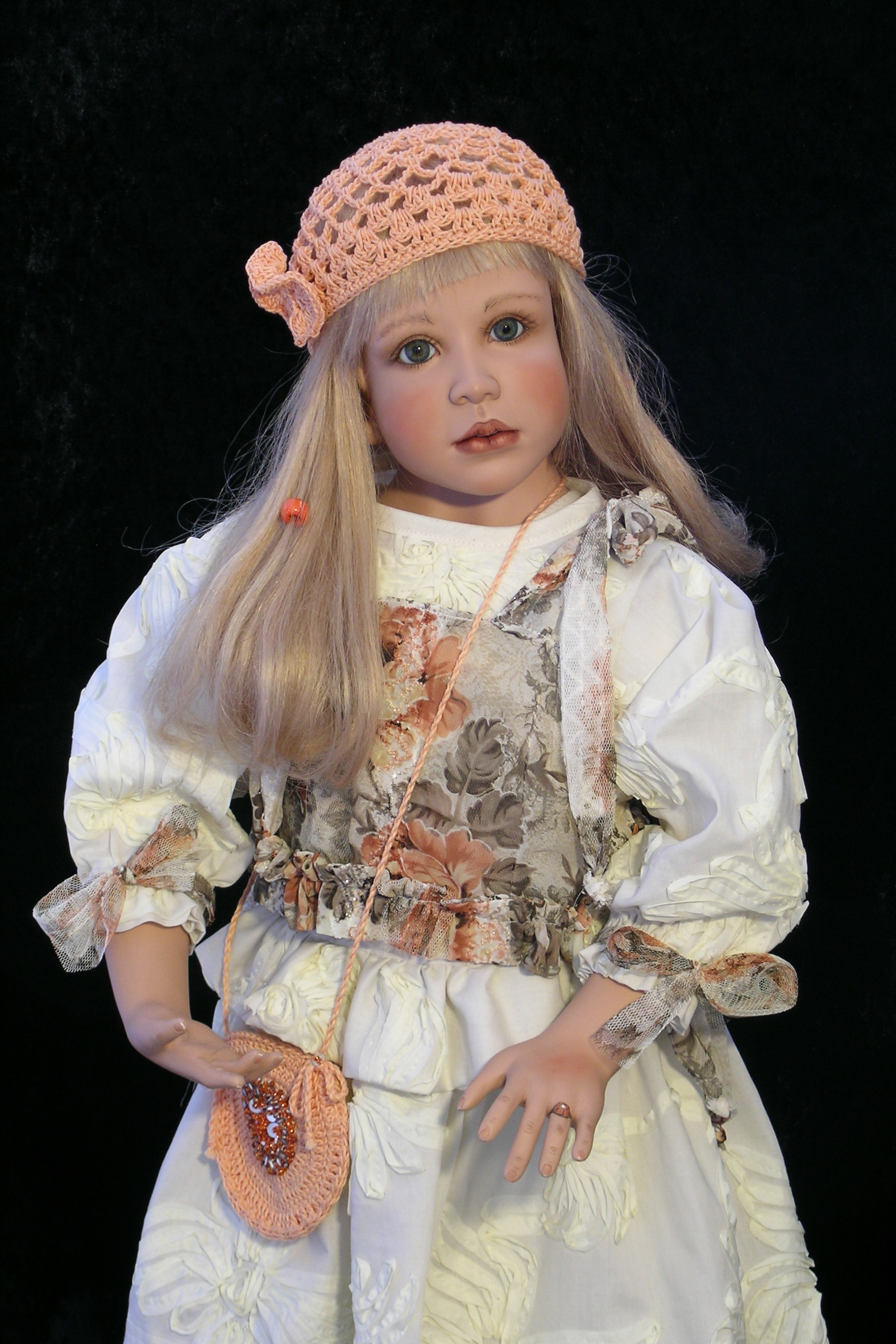 Kunstpuppe, Göre